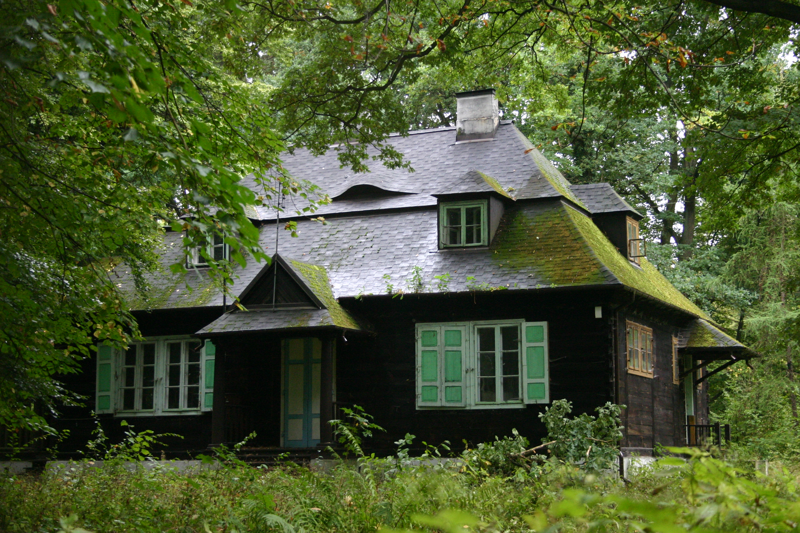 Zalesie Dolne, Willa „Siedziba”, zwana także „Starą Krauzówką”, ul. Anny Jagiellonki 10